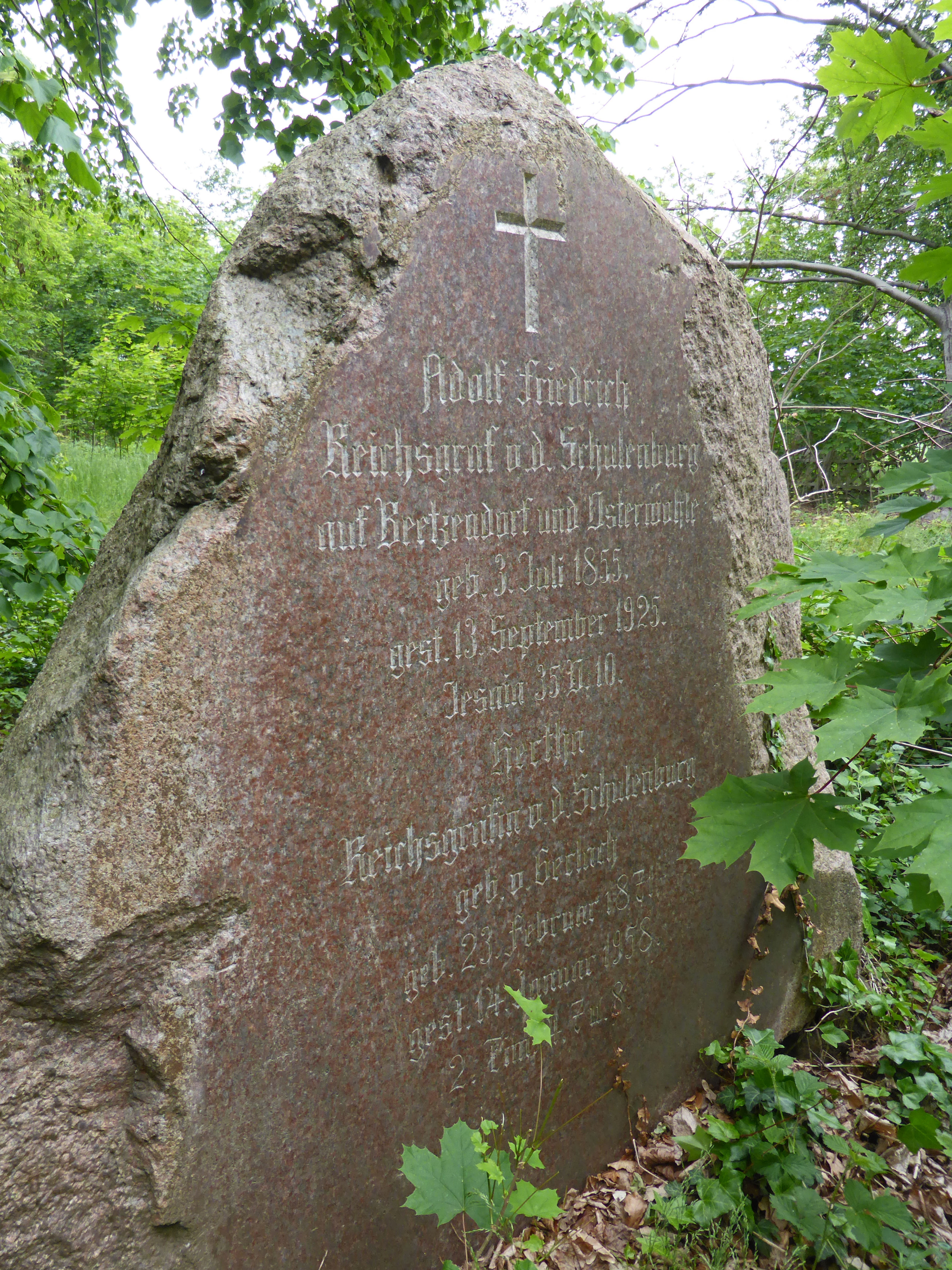 Gedenkstein an Adolf Friedrich Reichsgraf von der Schulenburg auf Beetzendorf und Osterwohle auf dem Schulenburg´schen Friedhof nahe Beetzendorf.